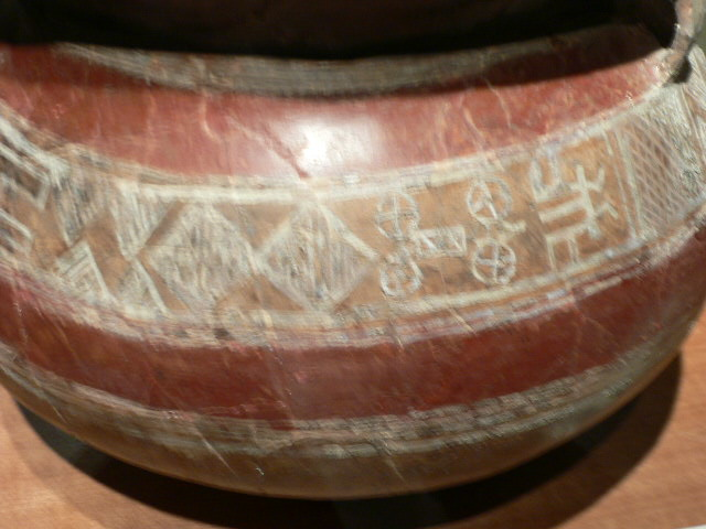 Vase, terre cuite, premier âge du fer, musée des antiquités nationales, Saint-Germain-en-Laye